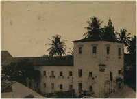 Restos do Torneão do Schoonzit ou Palácio da Boa Vista (construído por Maurício de Nassau), integrado ao Convento de Nossa Senhora do Carmo do Recife